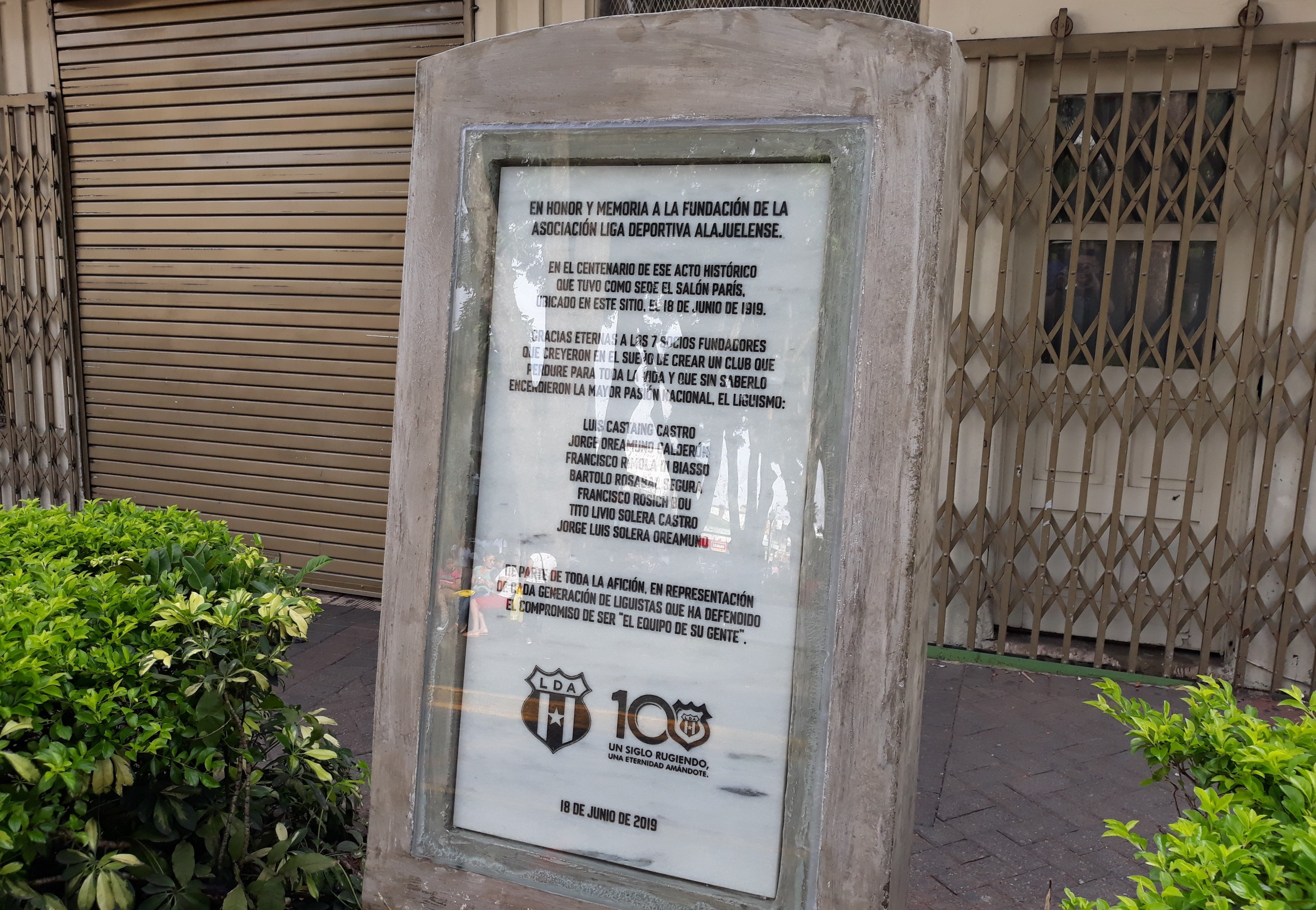 Placa conmemorativa por el centenario del lugar de orígen de Liga Deportiva Alajuelense, Soda La Torcaz, costado de Parque de Alajuela